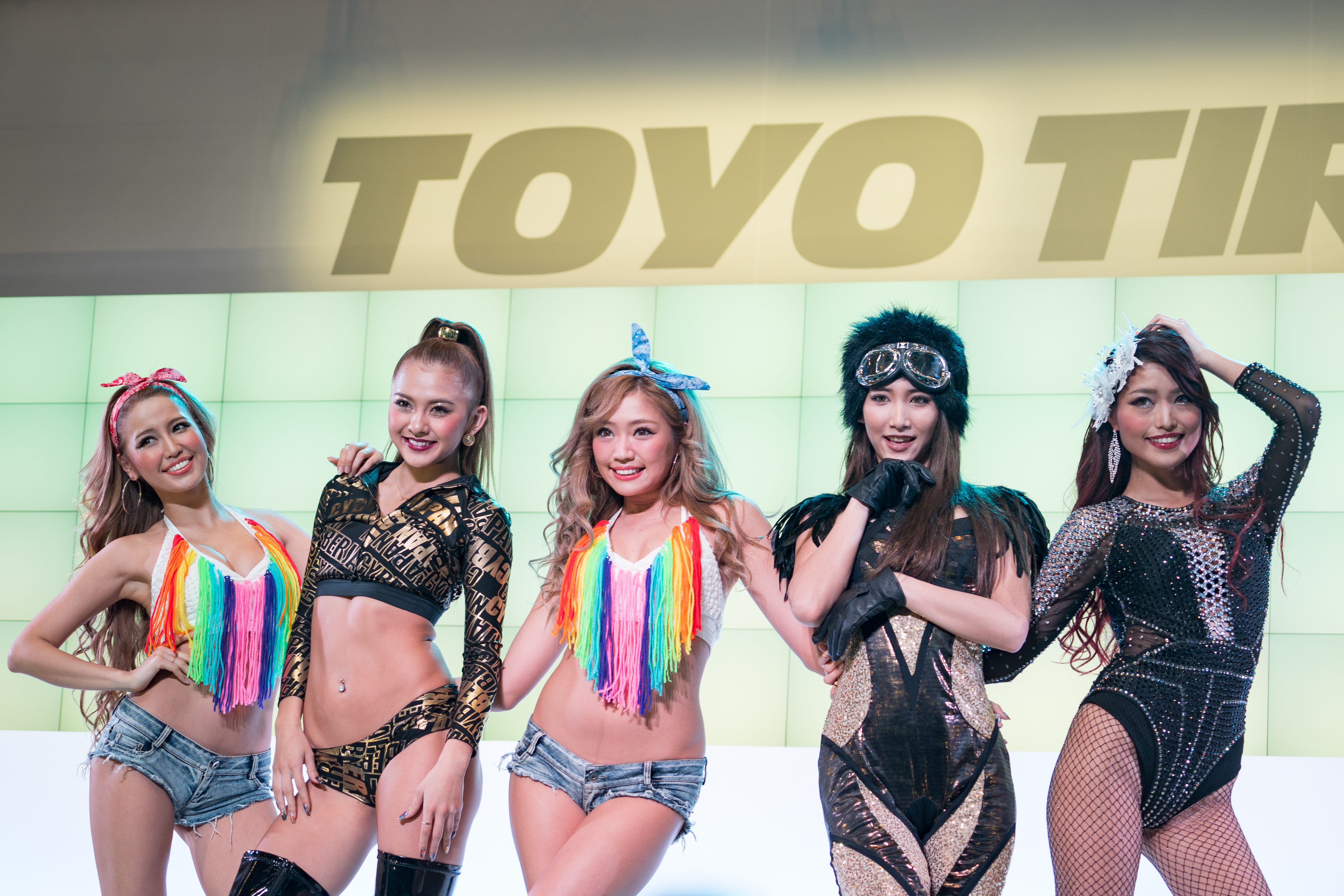 TOKYO AUTO SALON 2017 （東京オートサロン2017）-322.jpg